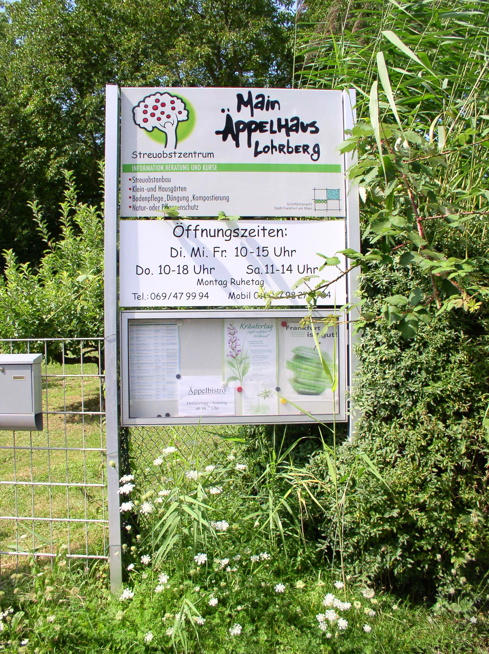 Informationstafel am „Main Äppelhaus Lohrberg“ – Informationszentrum zum Streuobstanbau im Frankfurter Stadtteil Seckbach.